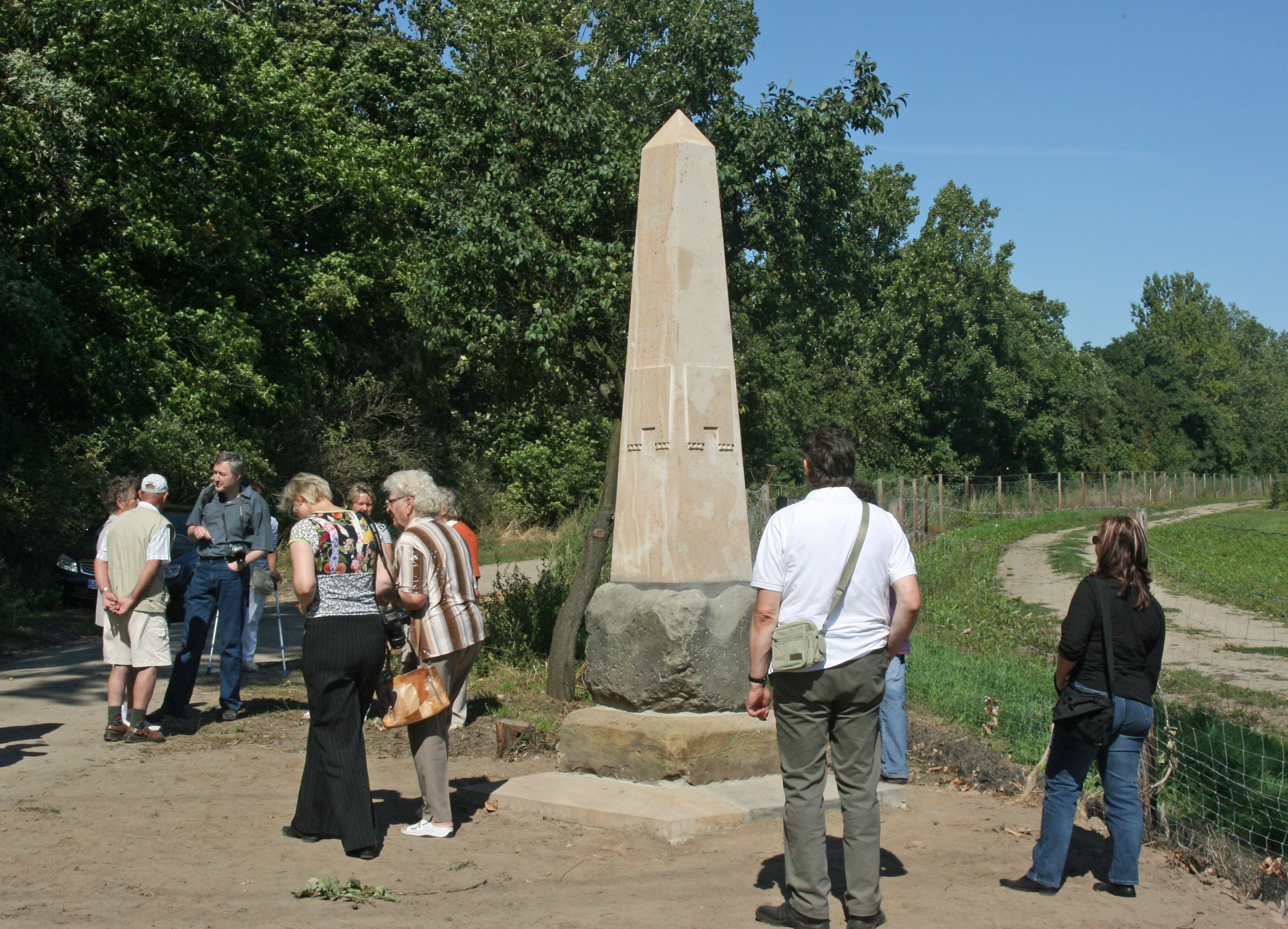 Ganzmeilenstein in Tremmen